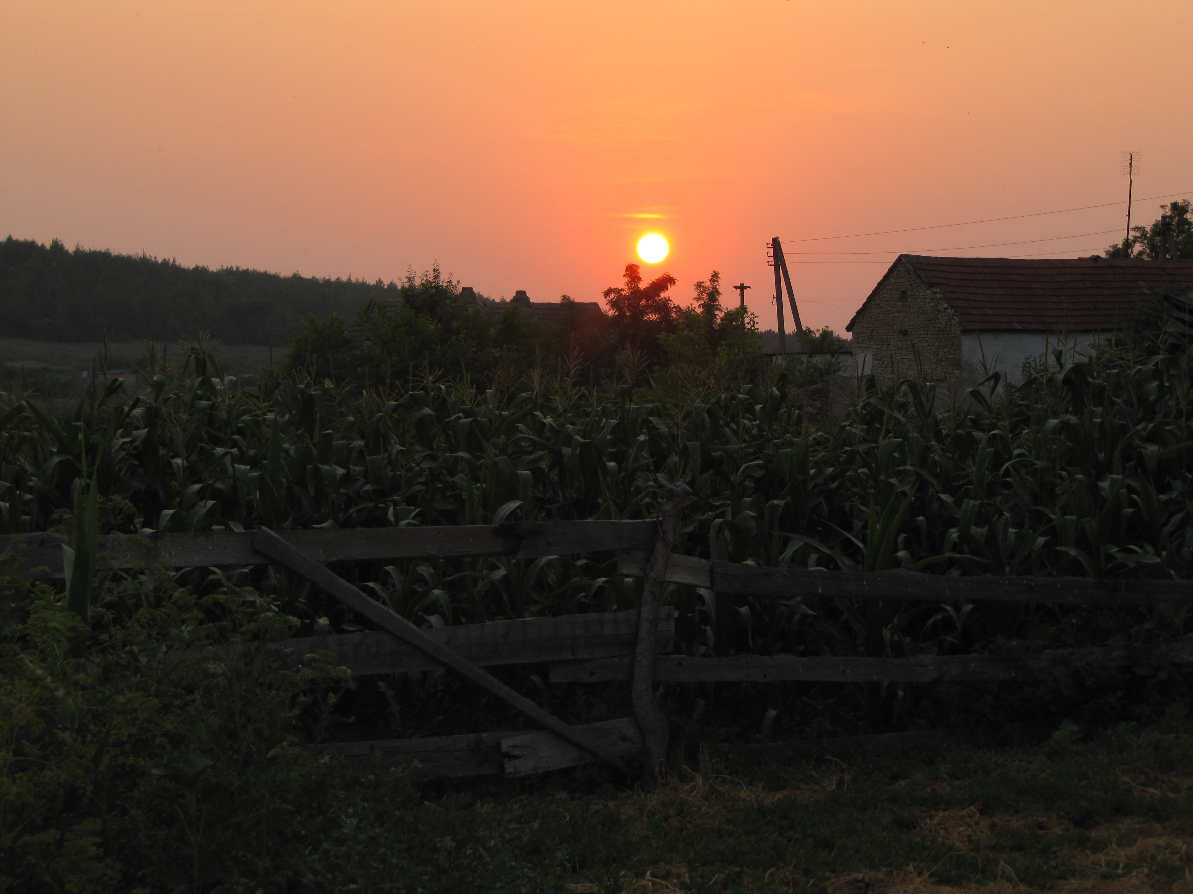 Вознесенський район, село Щербані, захід сонця Миколаївська весна у Вікіпедії